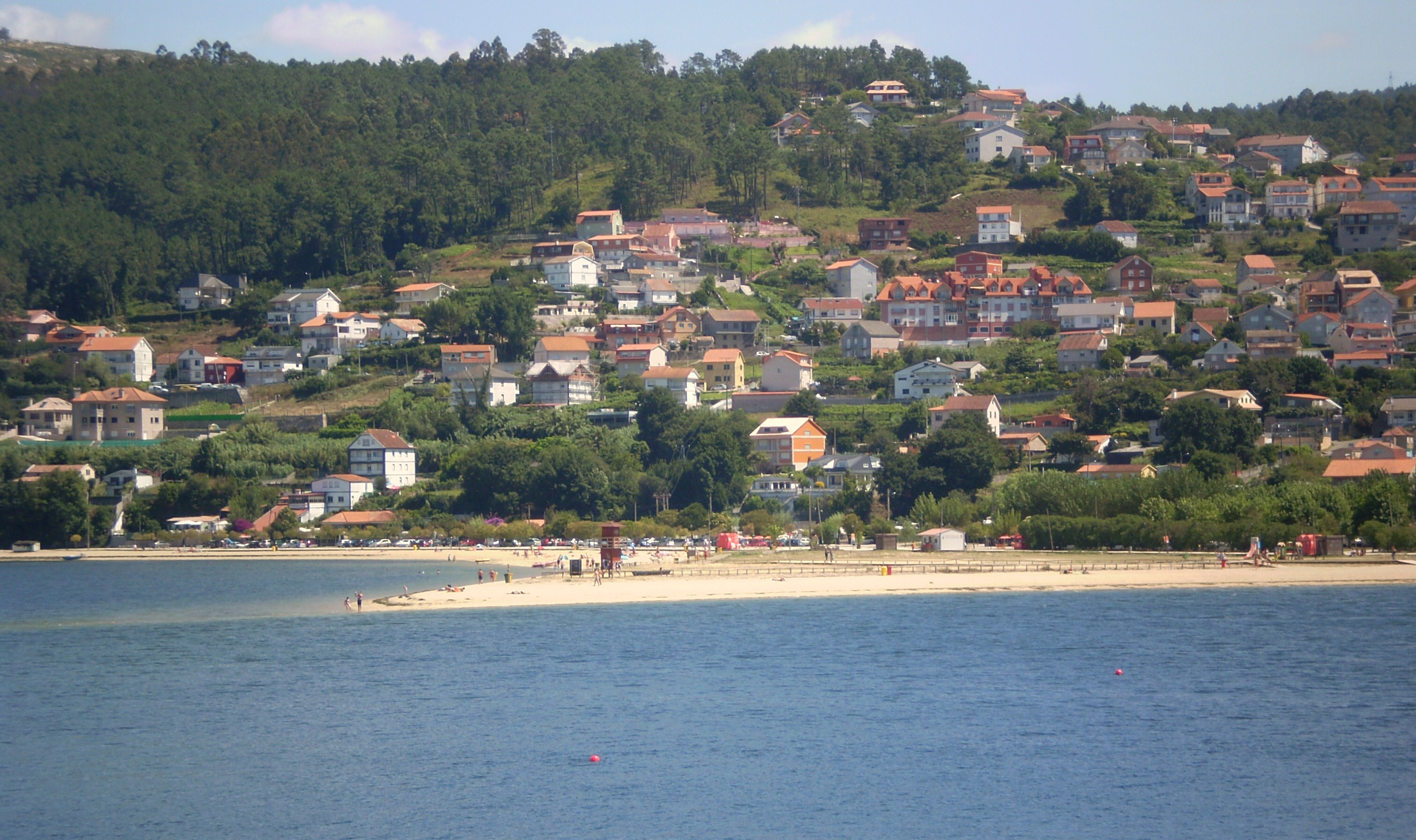 Vista de Cesantes, Redondela dende a illa de Santo Antón